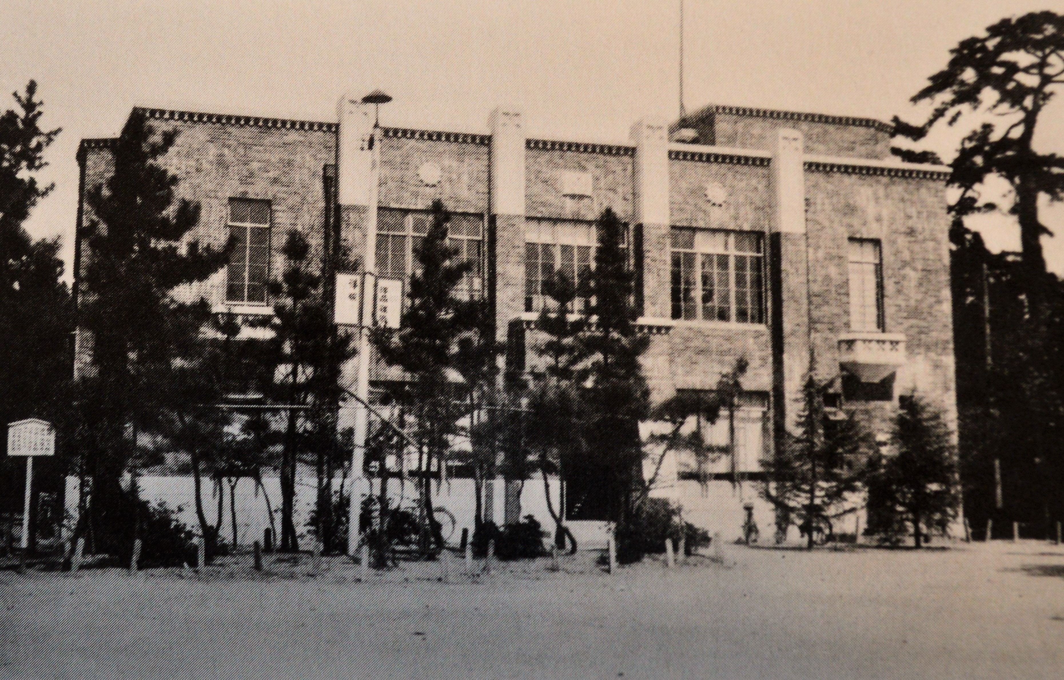 三重県四日市市の諏訪公園にあった四日市市立図書館。現在のすわ公園交流館。昭和初期に撮影。